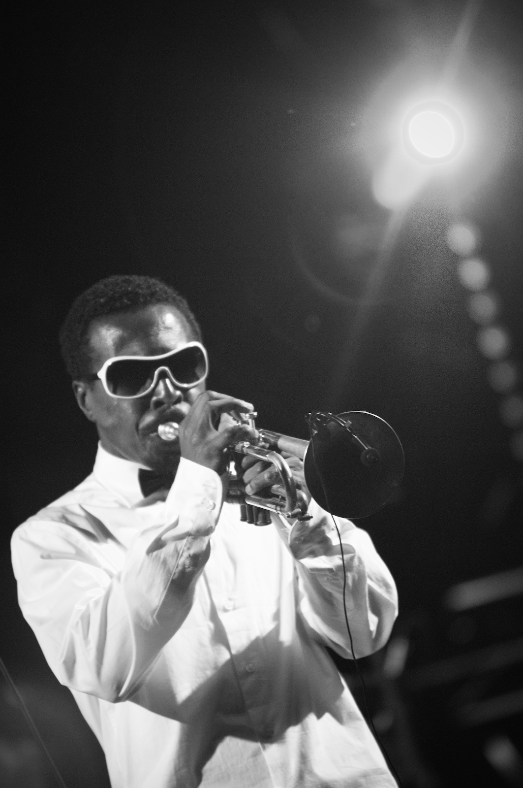 Roy Hargrove's RH Factor invite MC Solaar, Festival Jazz des Cinq Continents, Marseille Juillet 2009